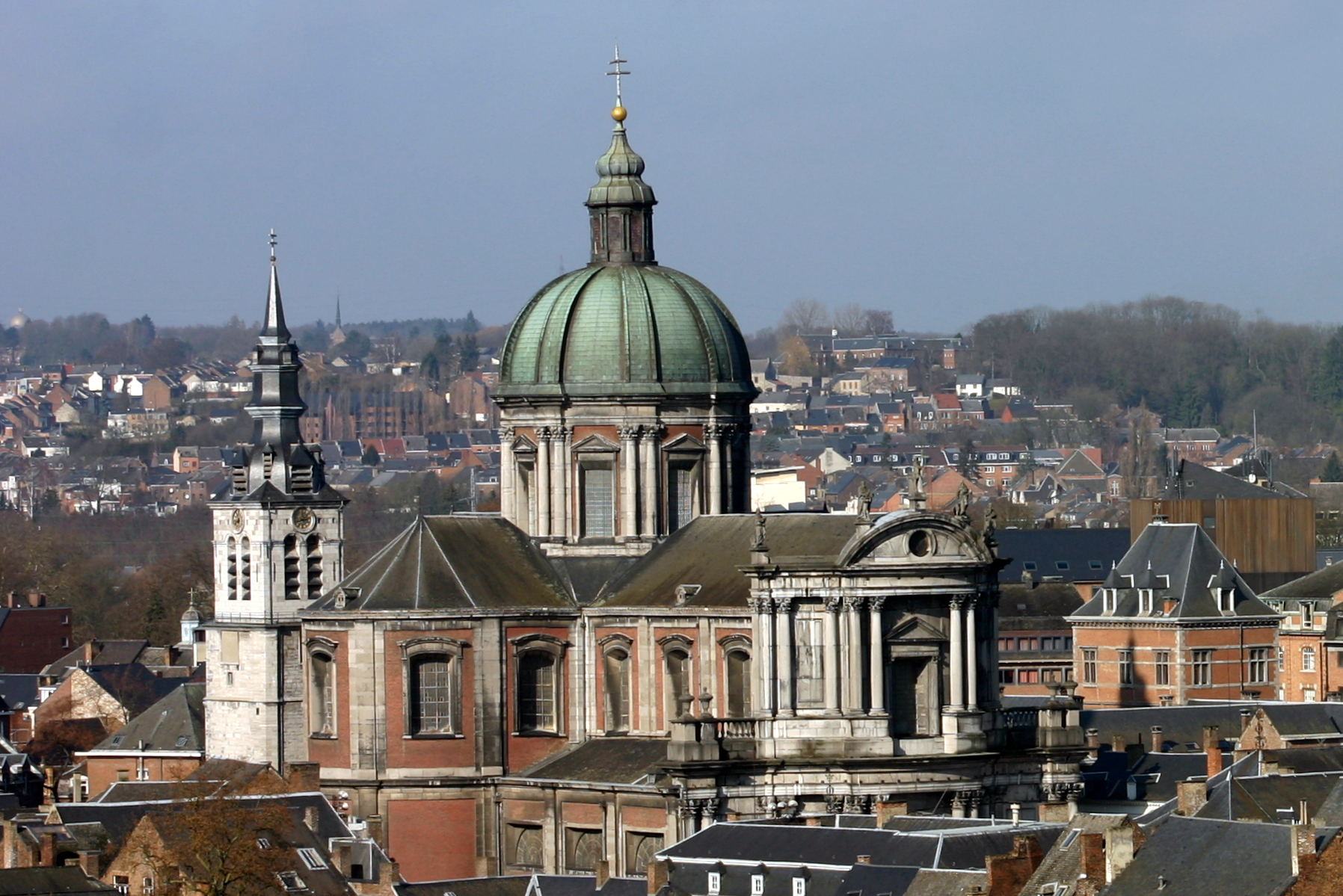 Cathédrale Saint-Aubain